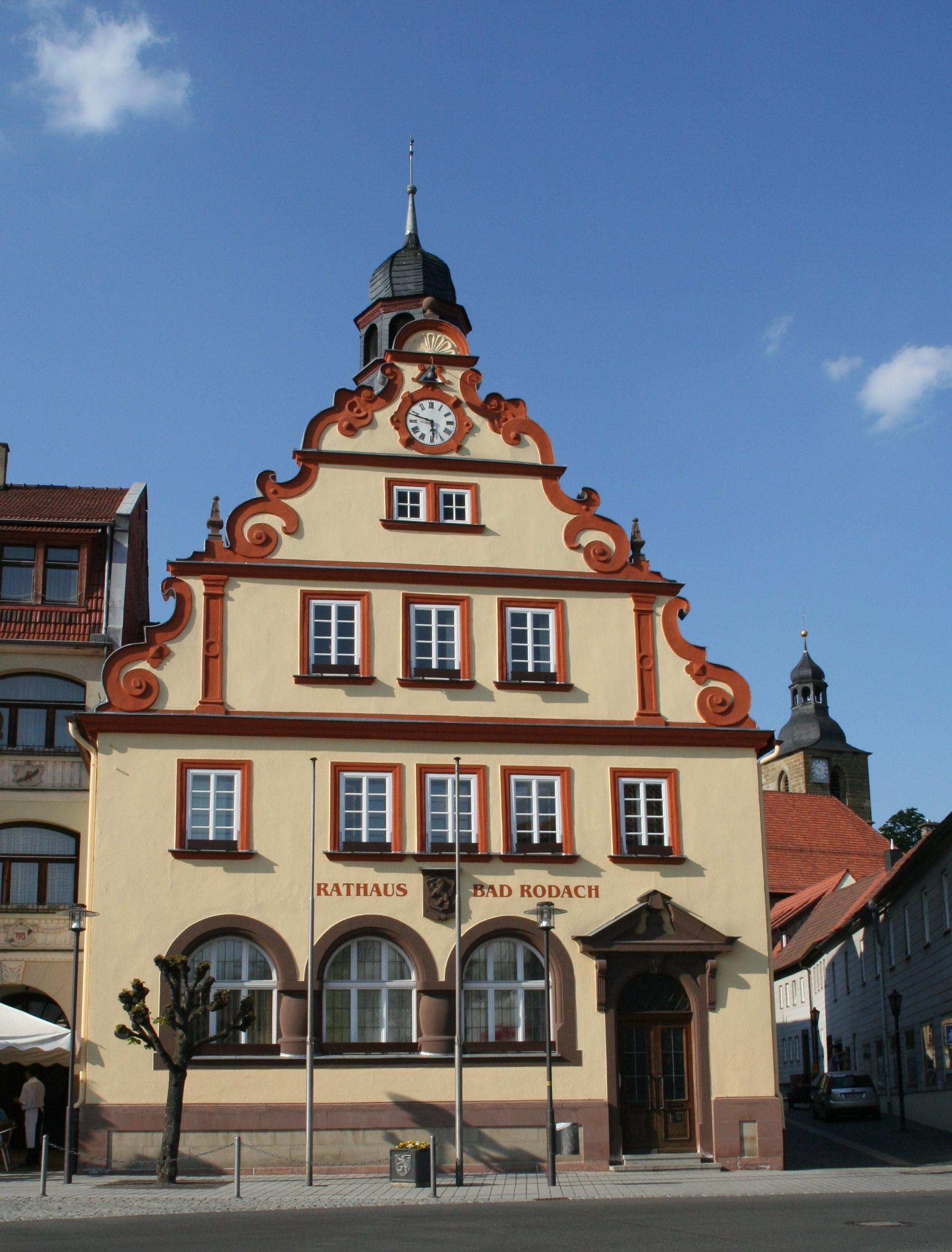 Rathaus Bad RodachRathaus Bad Rodach im Landkreis Coburg